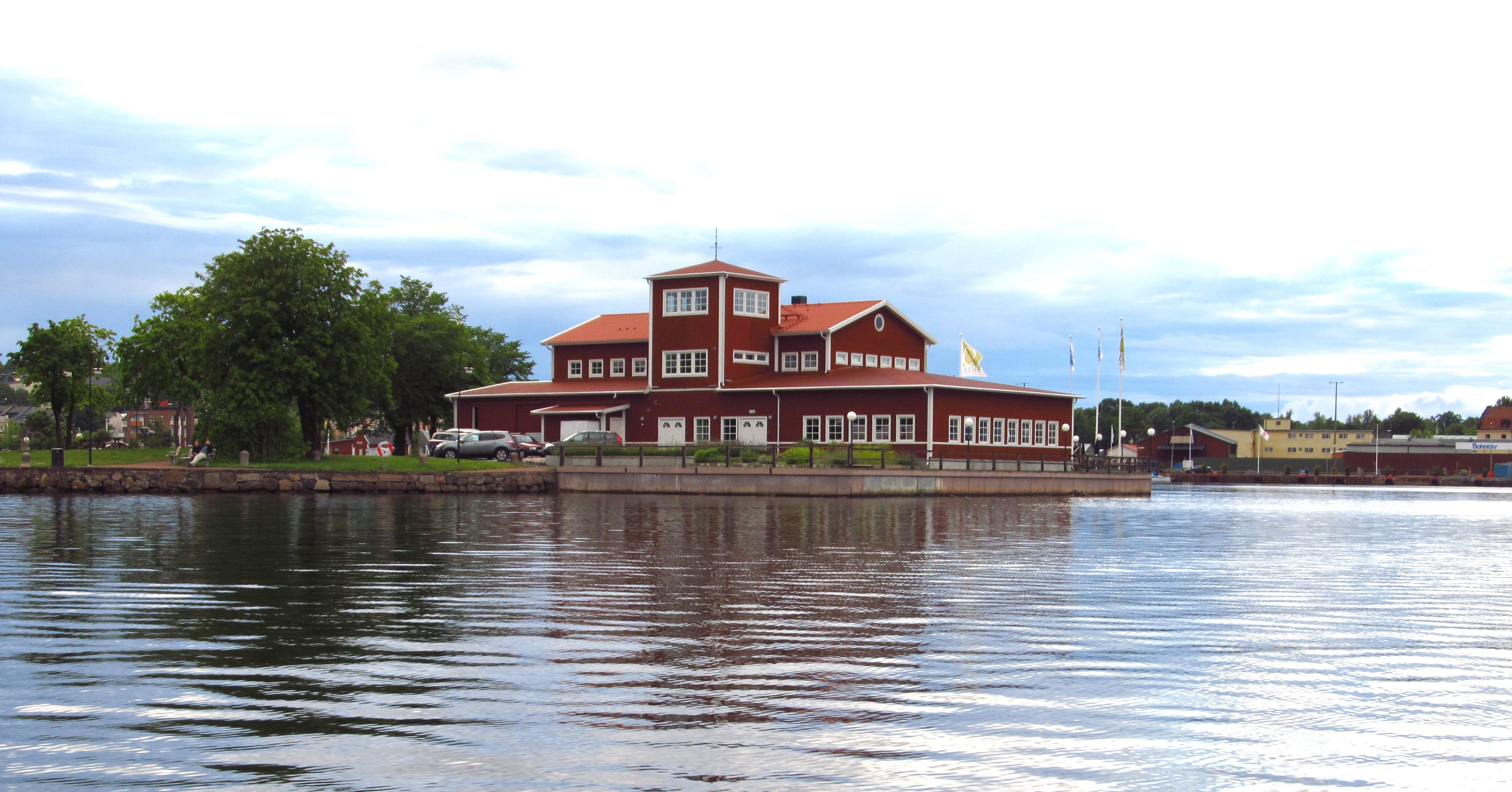 Badholmen Oskarshamn 2012. Restaurang- och konferensbyggnad.